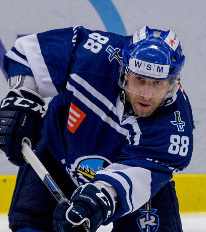 Václav Pletka; Rytíři Kladno - HC Slovan Ústí nad Labem 6-2